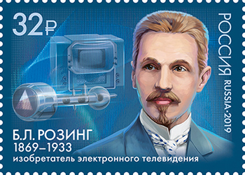 Почтовая марка России, выпущенная 6 мая 2019 года. На марке изображены изобретатель электронного телевидения Б. Л. Розинг, телевизор КВН-49, электронно-лучевая трубка. Дизайнер — А. Крадышев. Номер по каталогу — 2471.